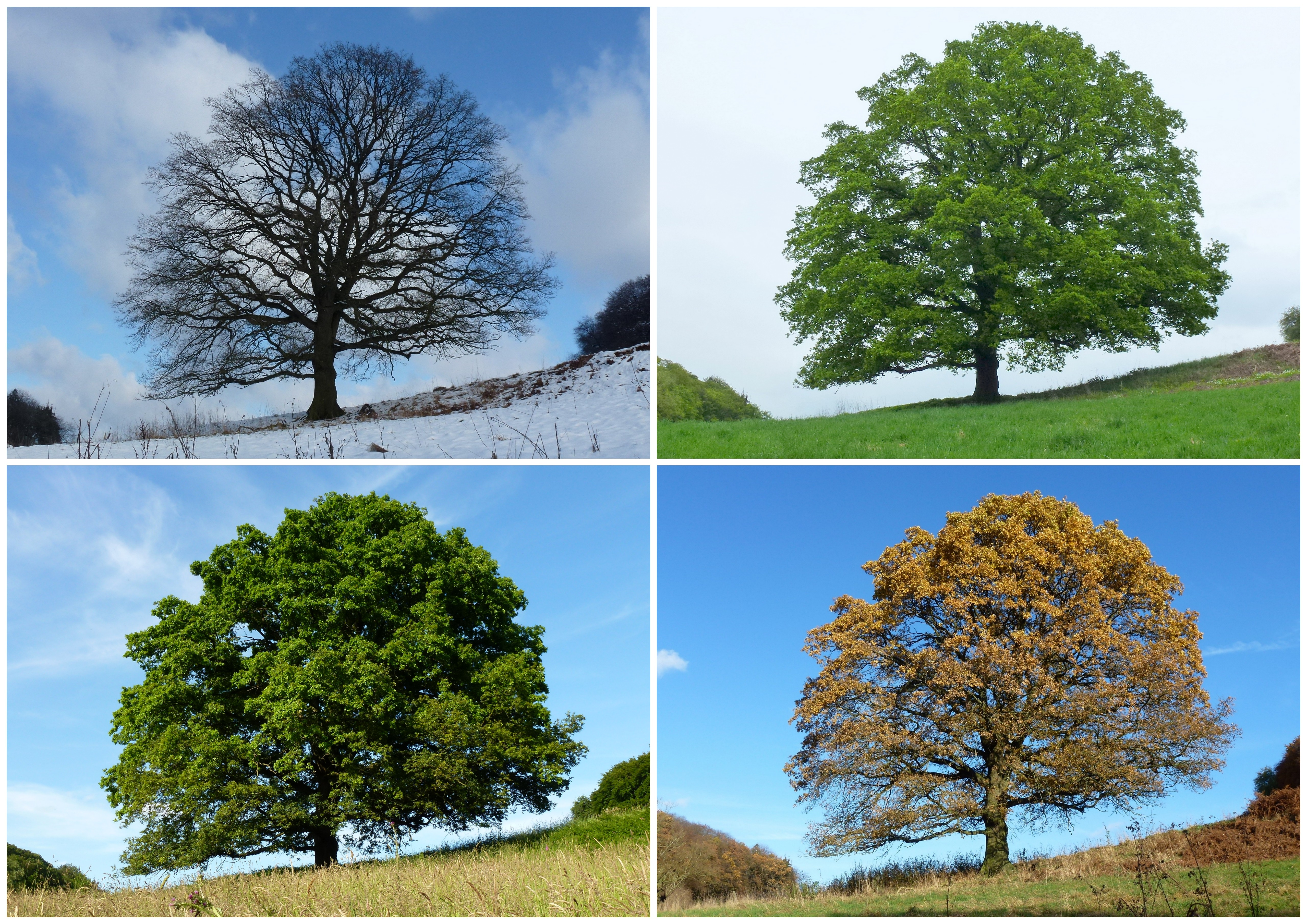 Eiche im Felderbachtal bei Velbert-Nierenhof im Wandel der Jahreszeiten